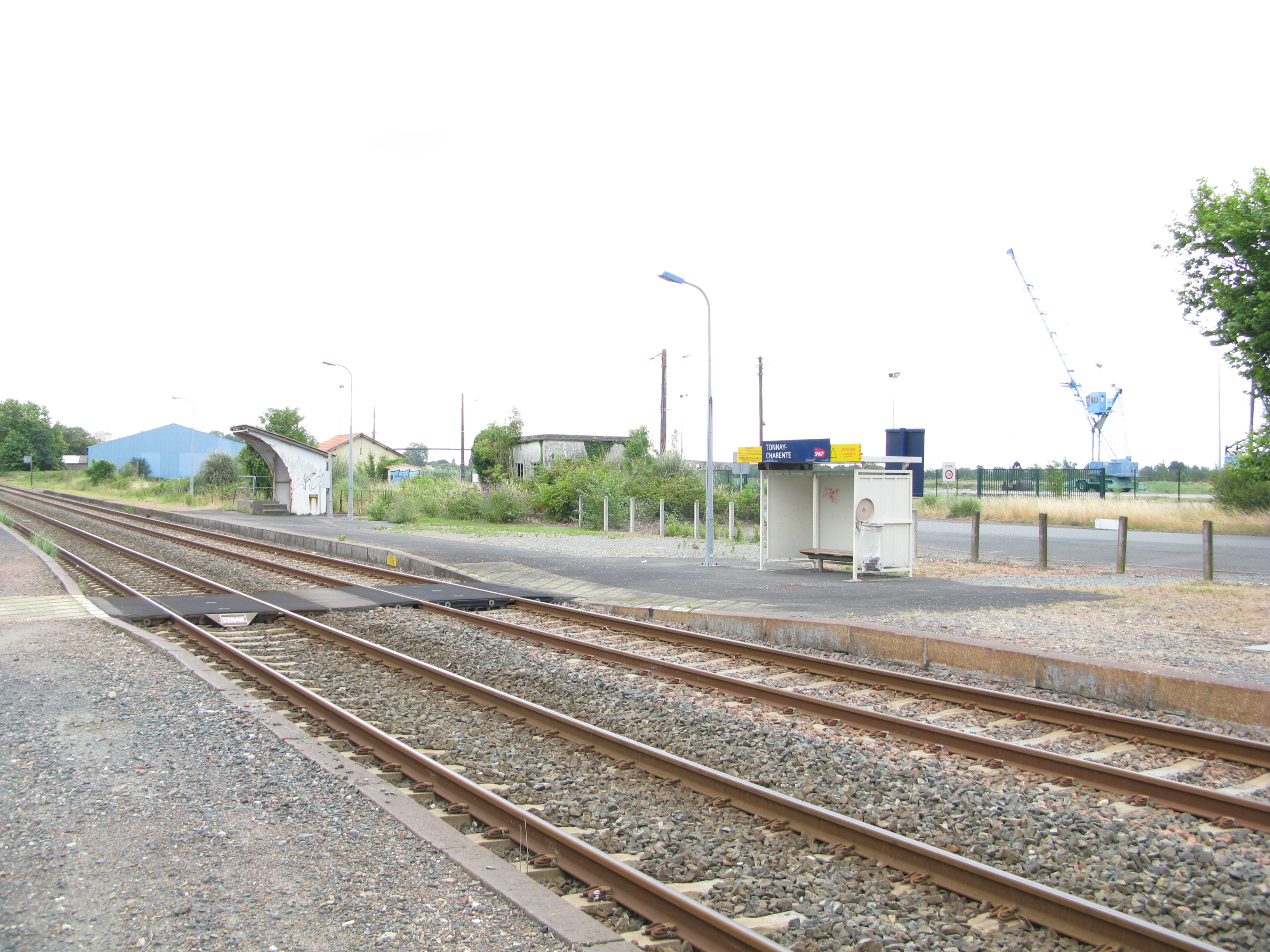 La halte SNCF avec ses voies et quais, il n'y a plus de bâtiment voyageurs mais des abris de quai.